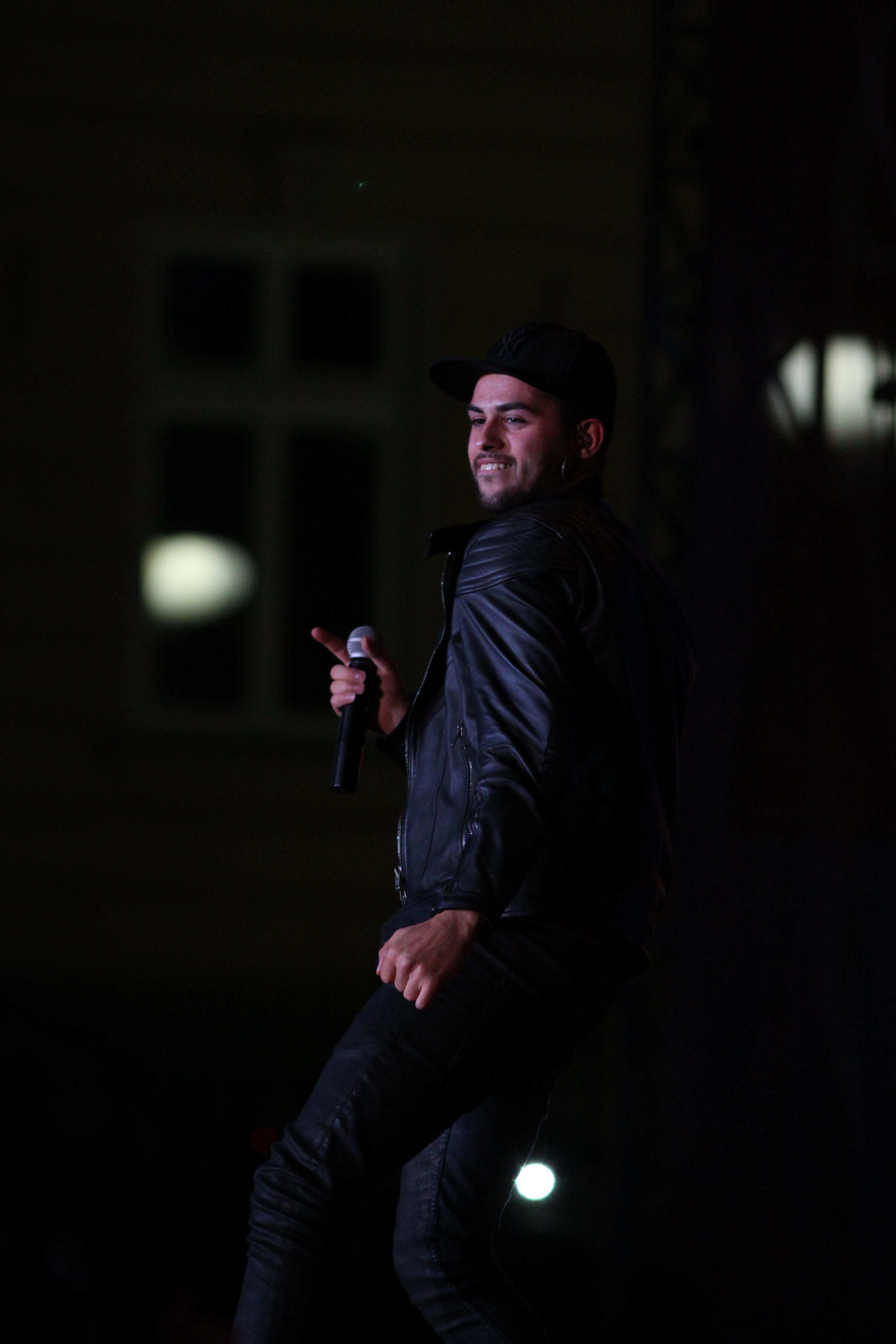 Алекс мика - румънски поп изпълнител.